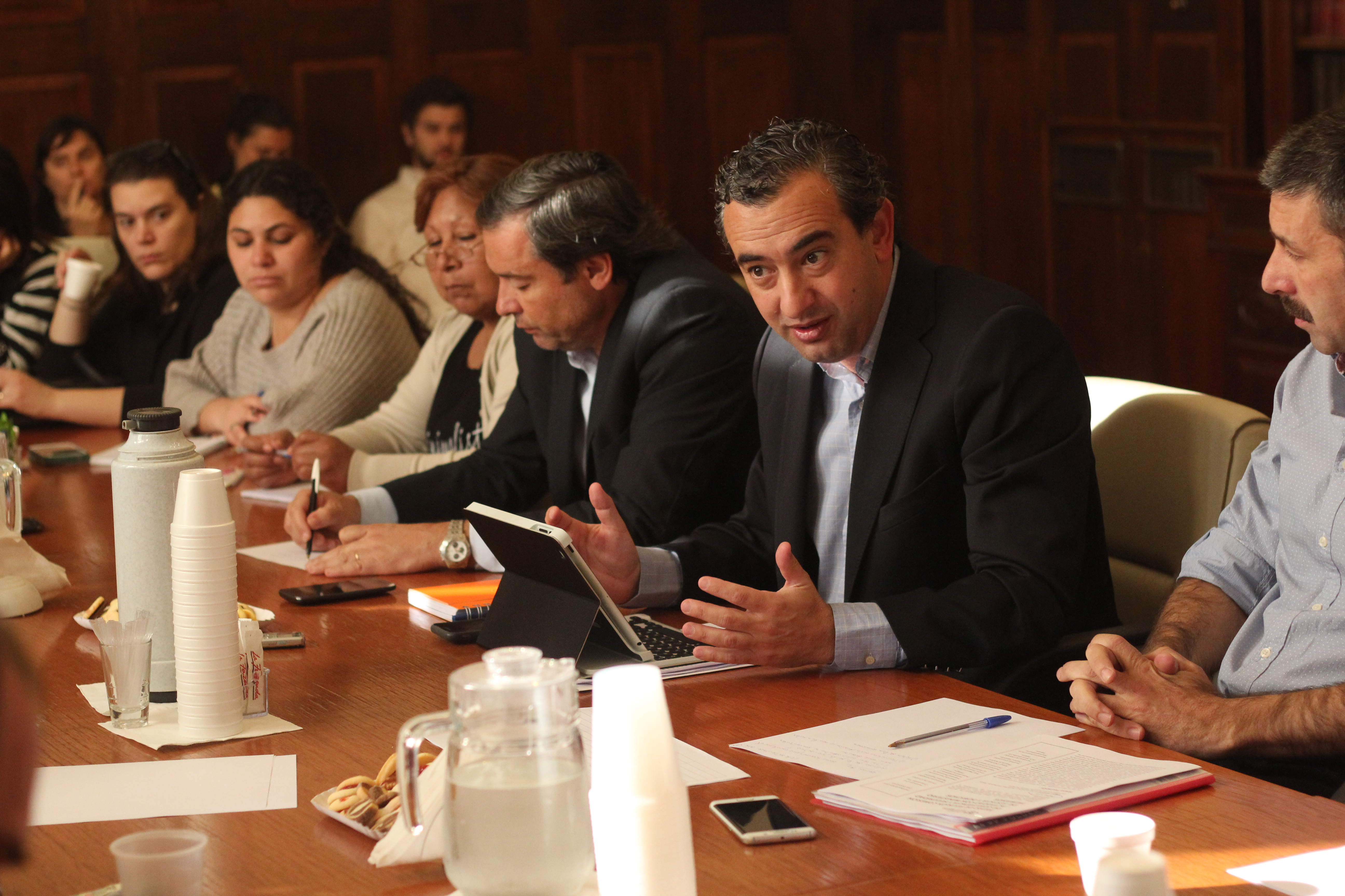 Javkin encabezando la Comisión de Convivencia y Seguridad del Consejo Económico y Social